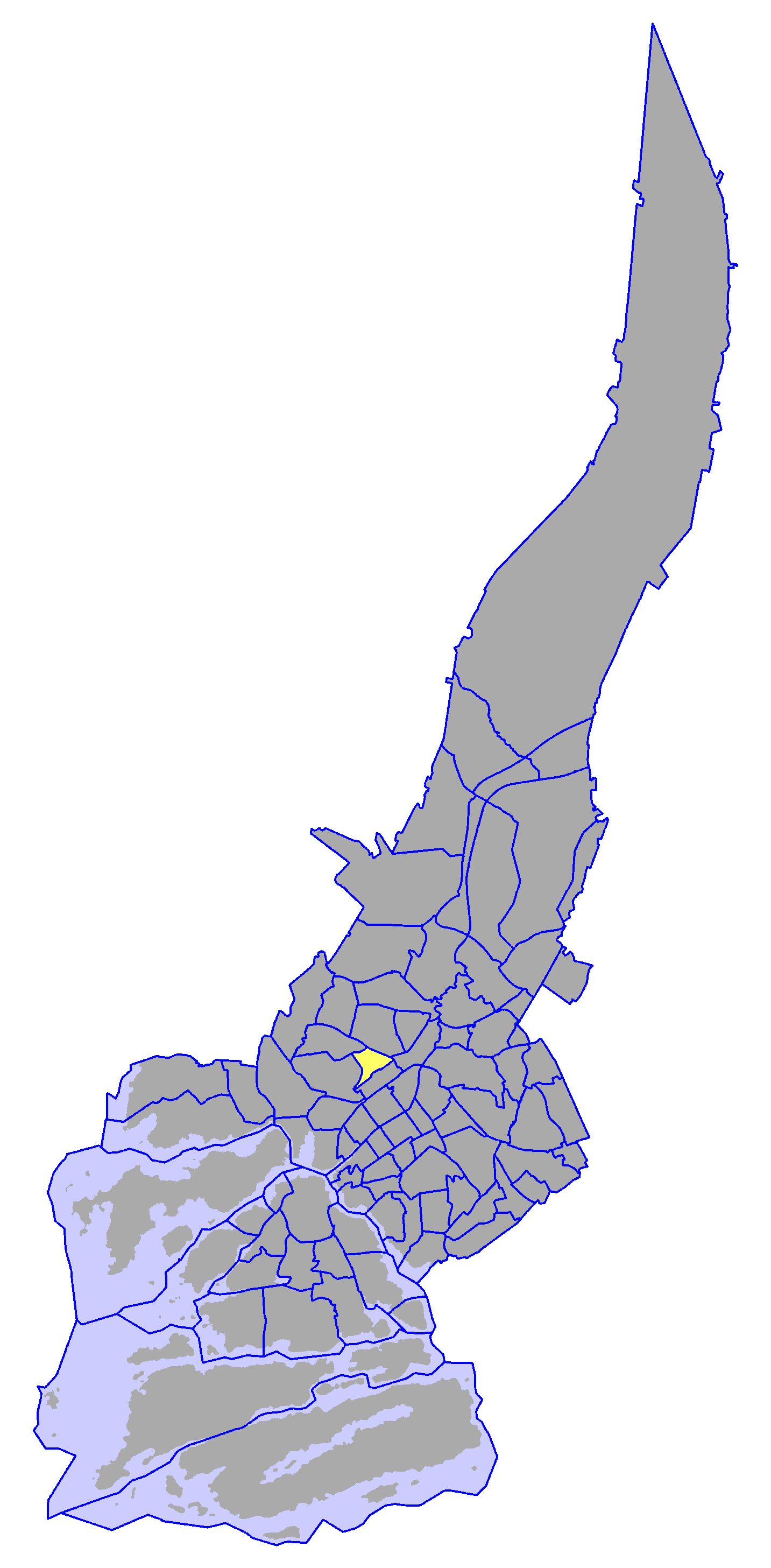 District of Kähäri, in Turku